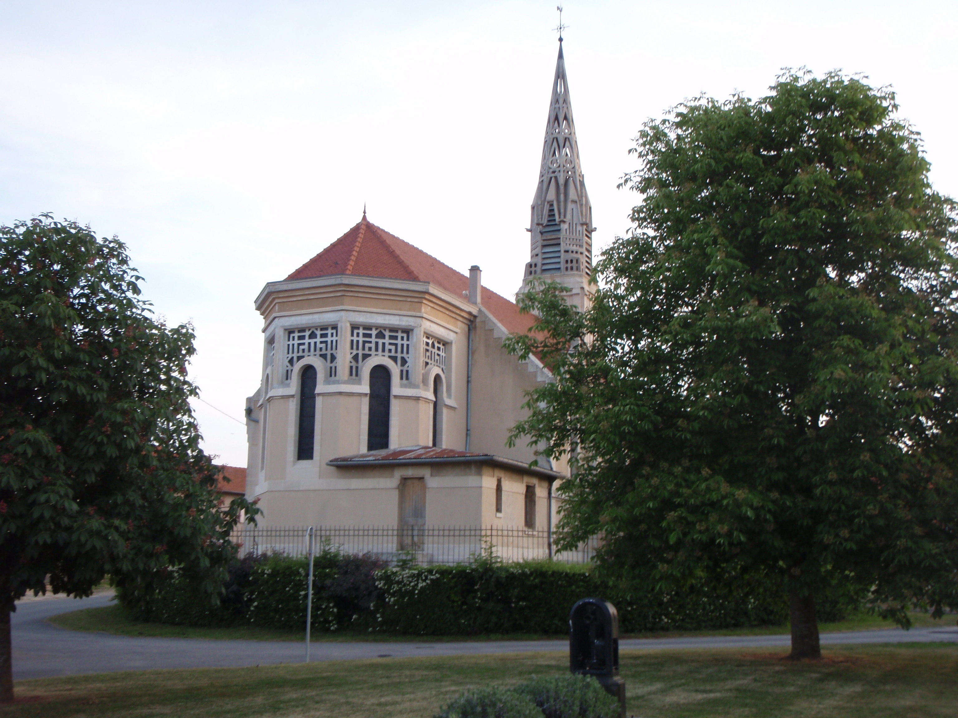 église de MOGEVILLE MEUSE (55400)